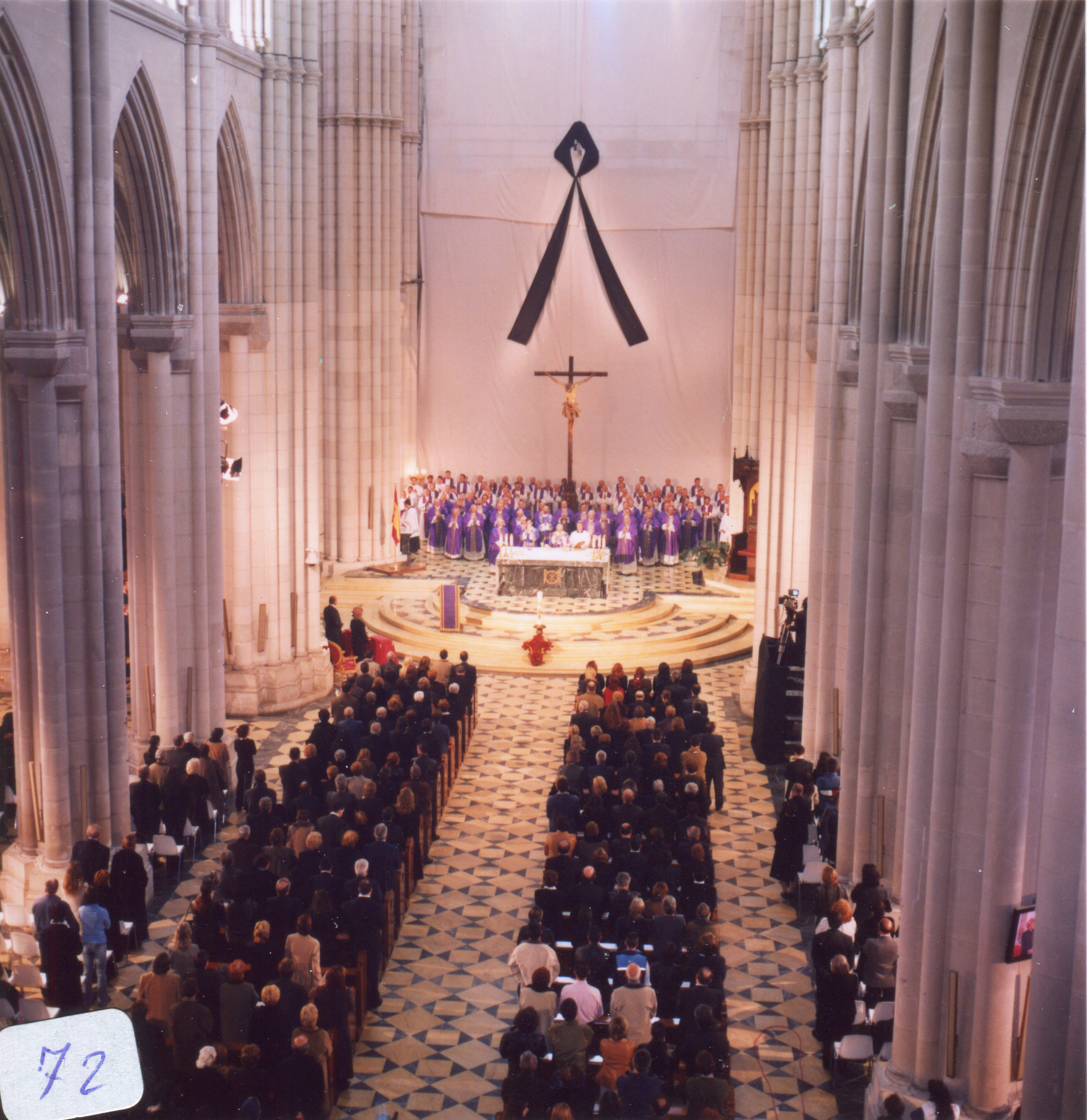 Créditos: Archimadrid